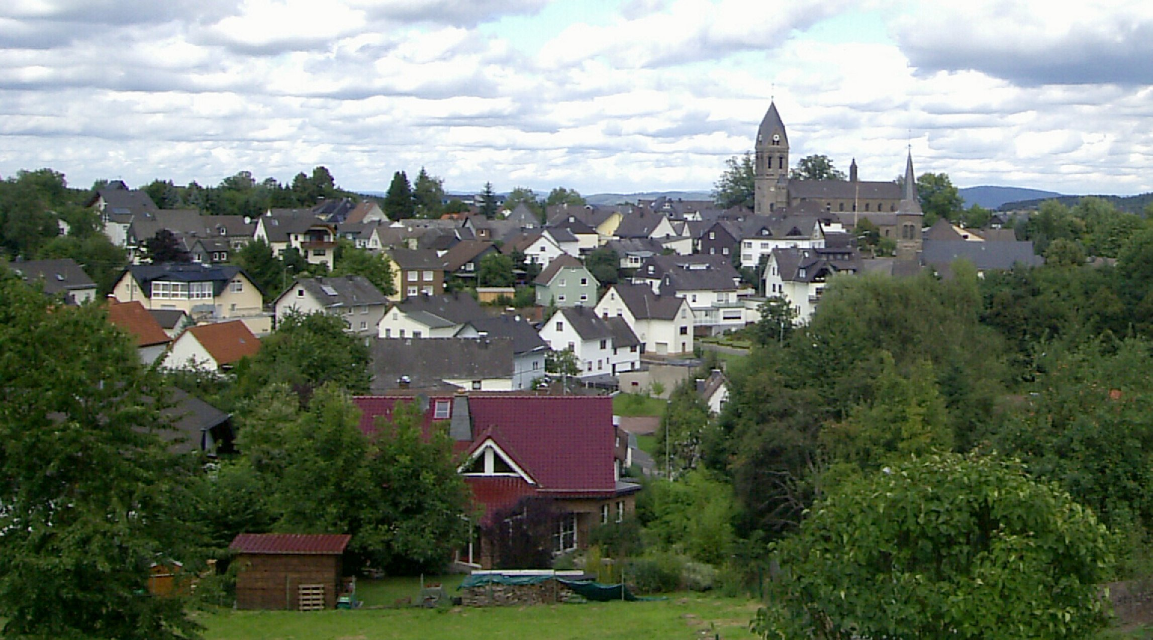 Blick auf Gebhardshain